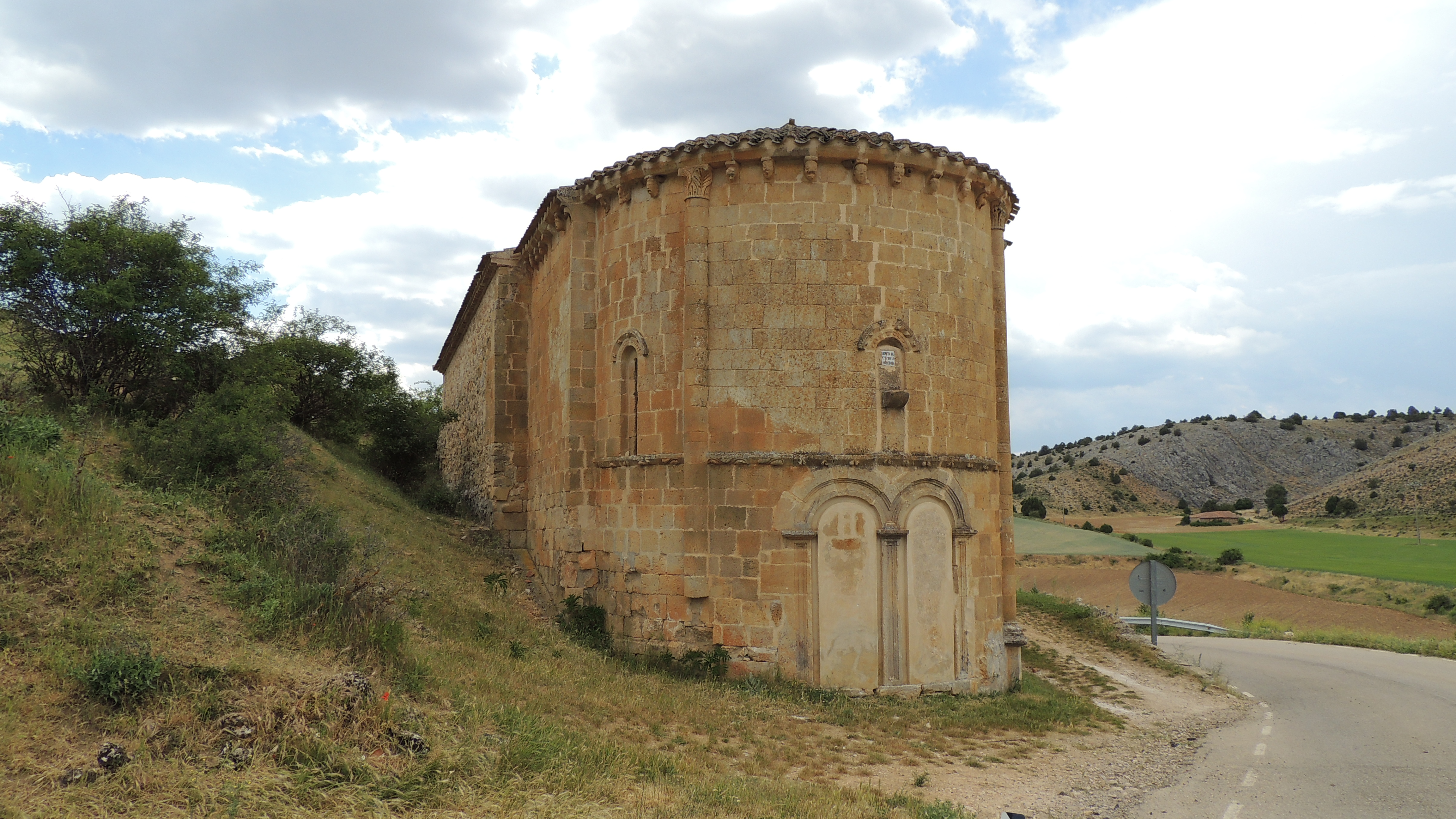 Ermita de la Soledad de Calatañazor